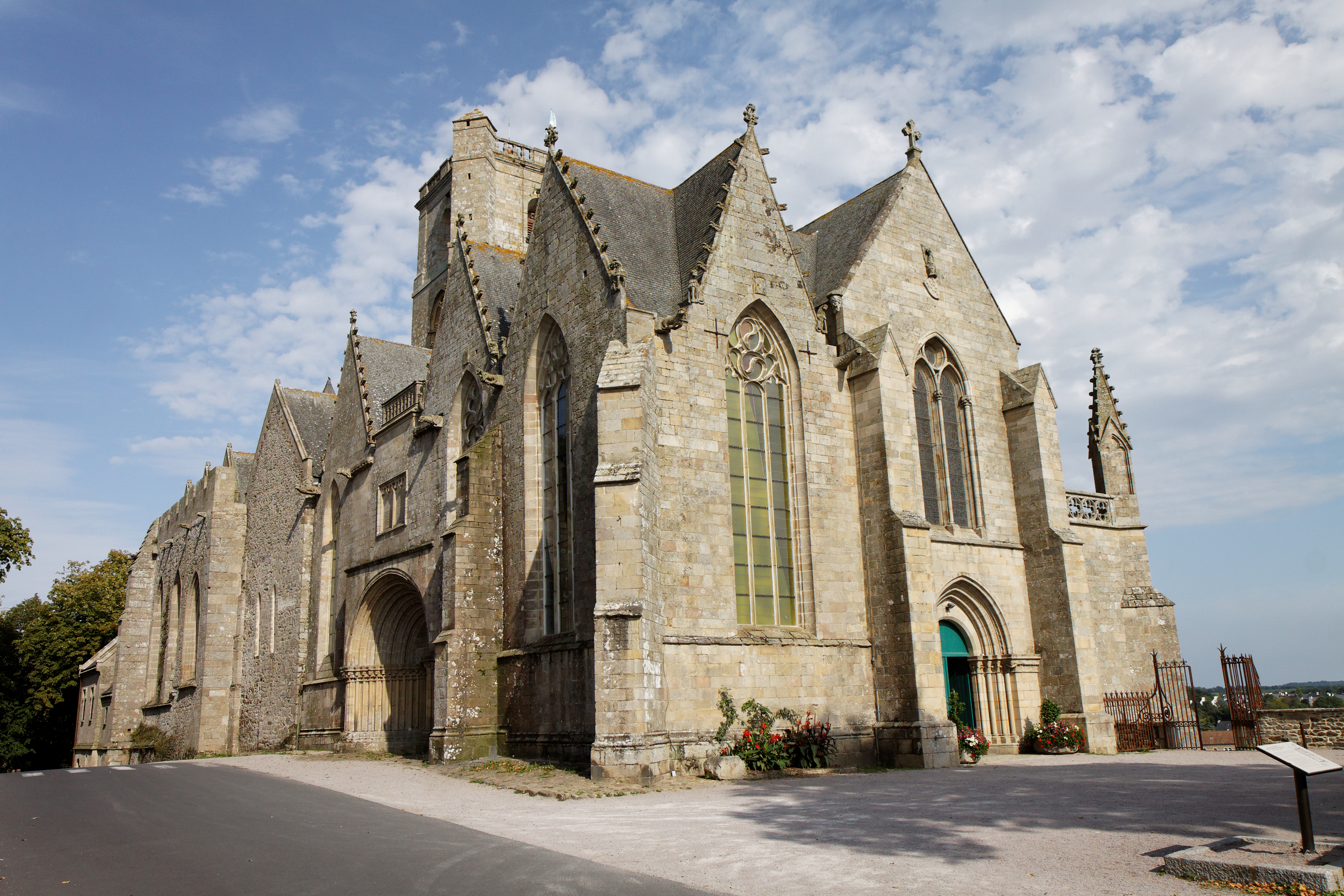 La collégiale Notre-Dame à Lamballe (Côtes d'Armor).